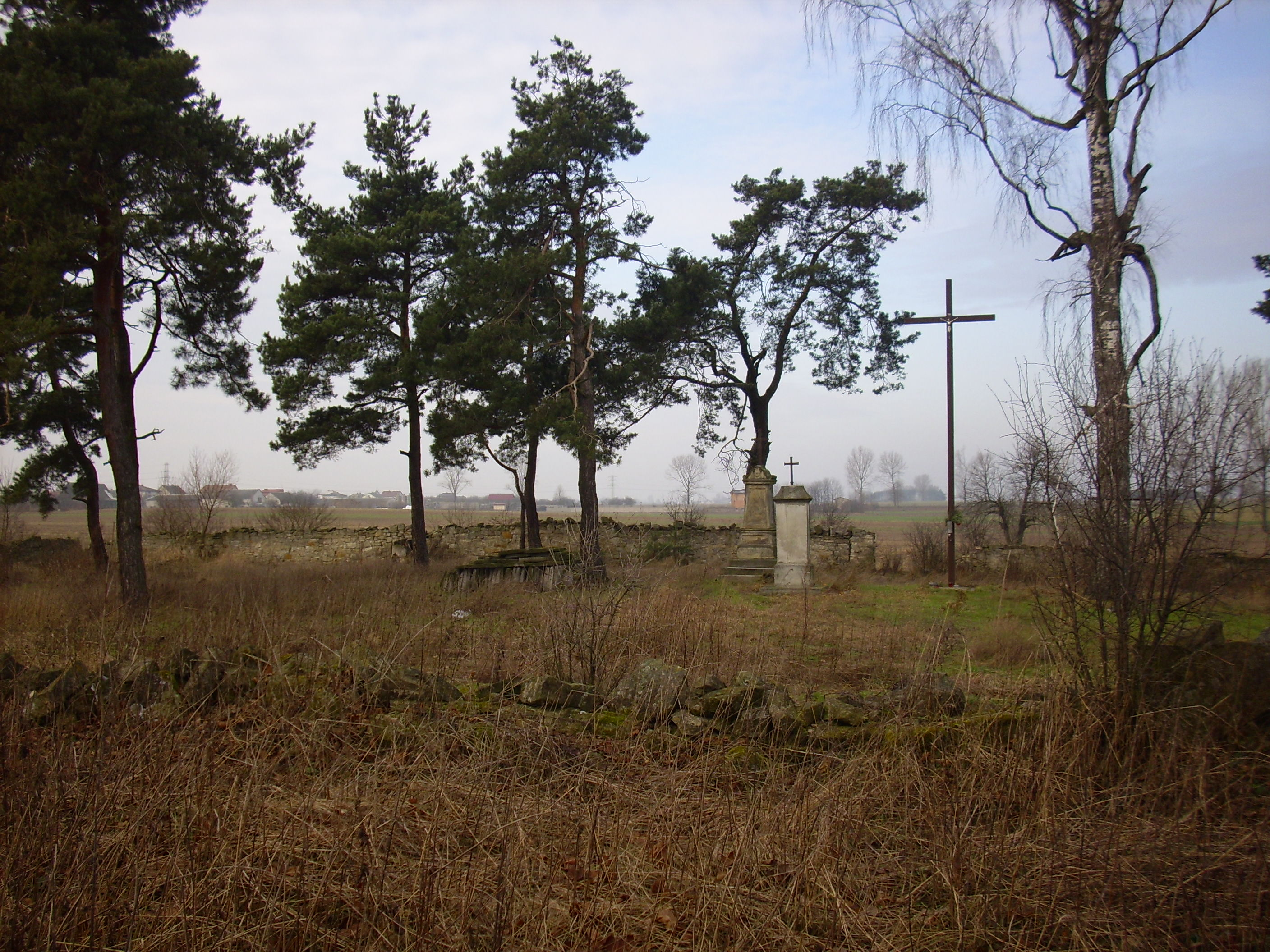 Cmentarz choleryczny z XIX w. w Zalesicach-Kolonii